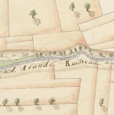 Détail montrant le ruisseau « l'Arande » faisant frontière entre l'ancienne commune de Compesières dans le canton de Genève et Saint-Julien en Savoie. Détail d'une carte topographique des frontières du duché de Savoie et du canton de Genève dressée en exécution du traité de Turin du 16 mars 1816 et du procès-verbal de plantation des bornes du 20 octobre 1819. Voir en ligne.